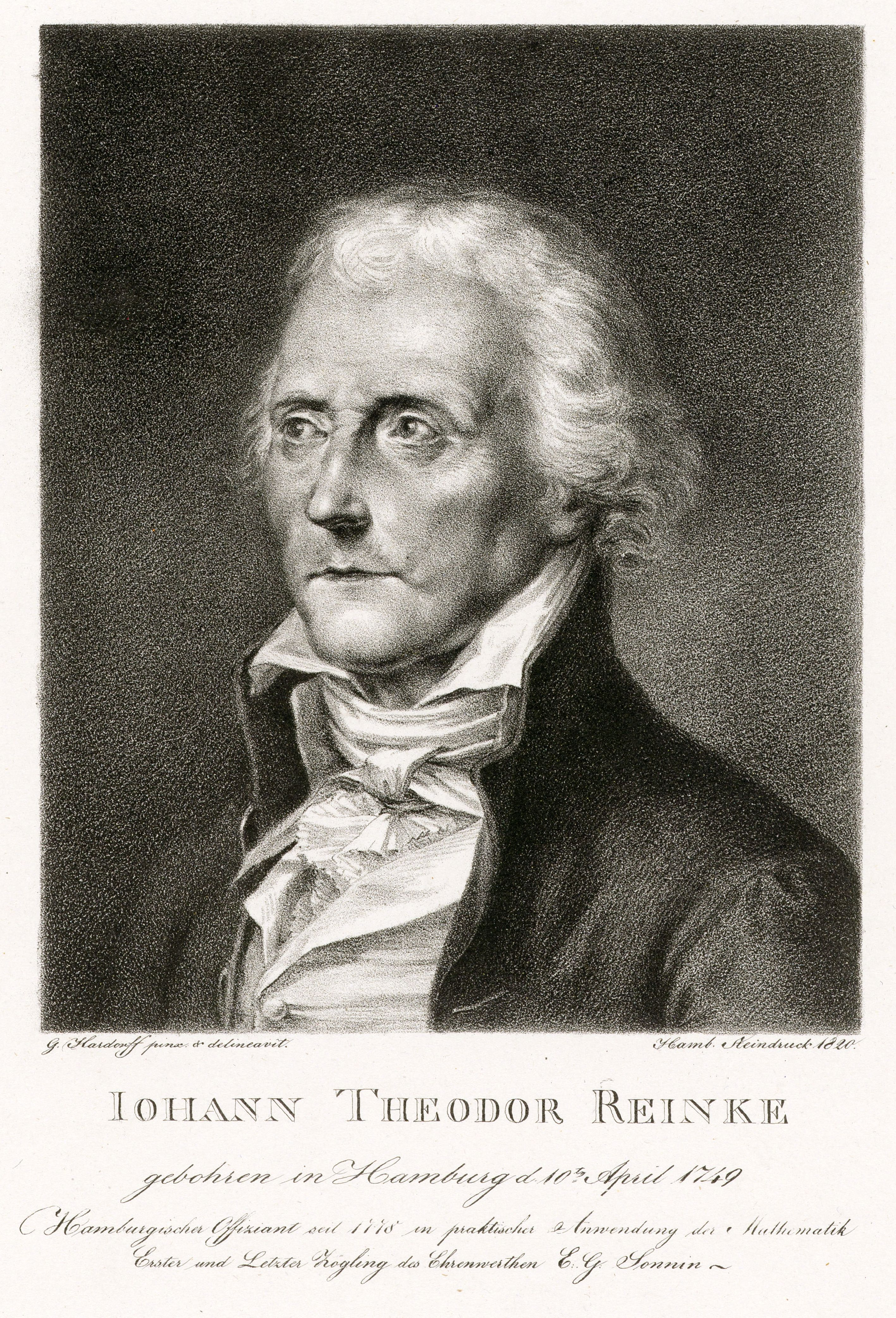 Iohann Theodor Reinke